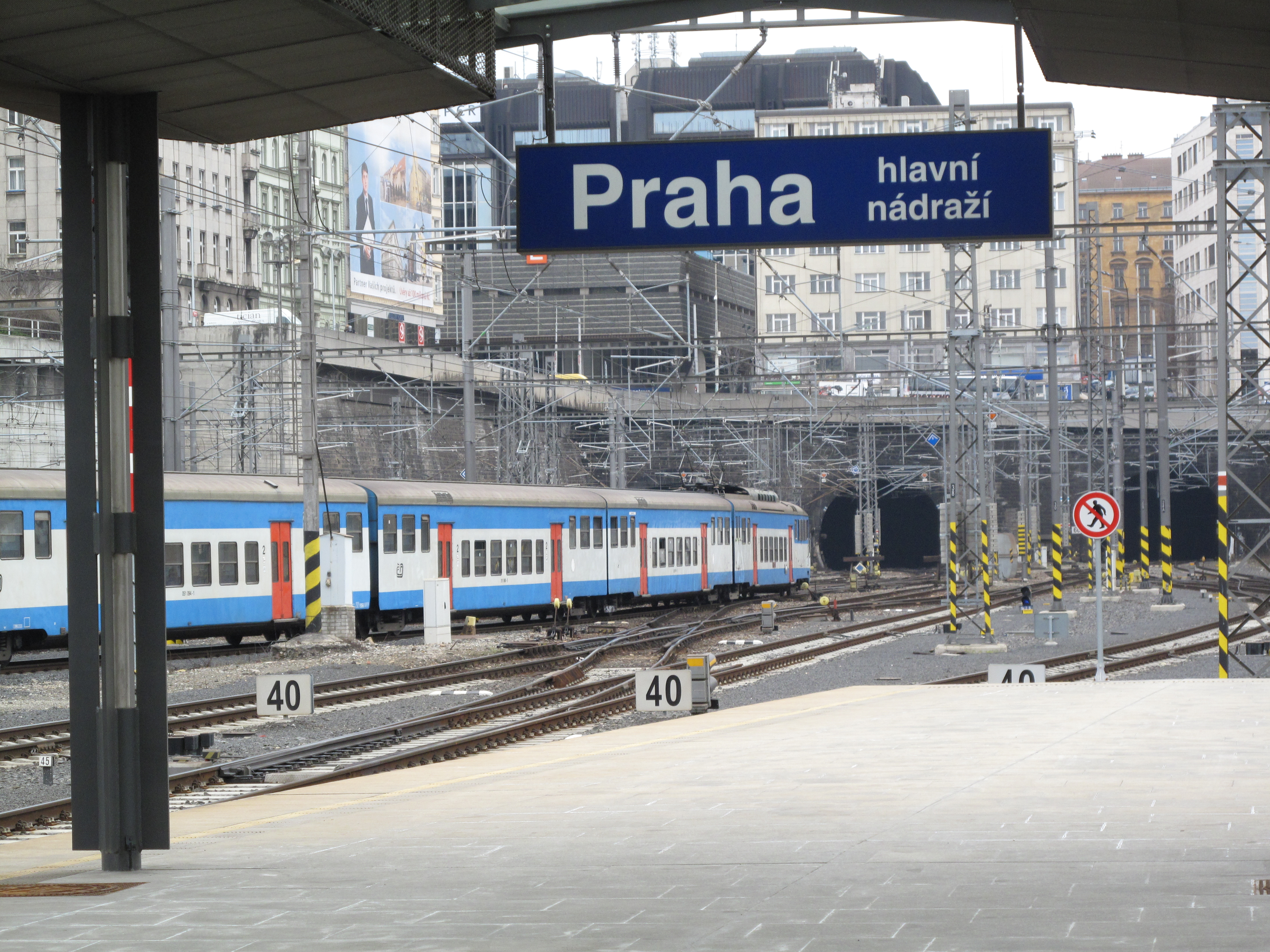 Jednotka 451 v Praze na Hlavním nádraží